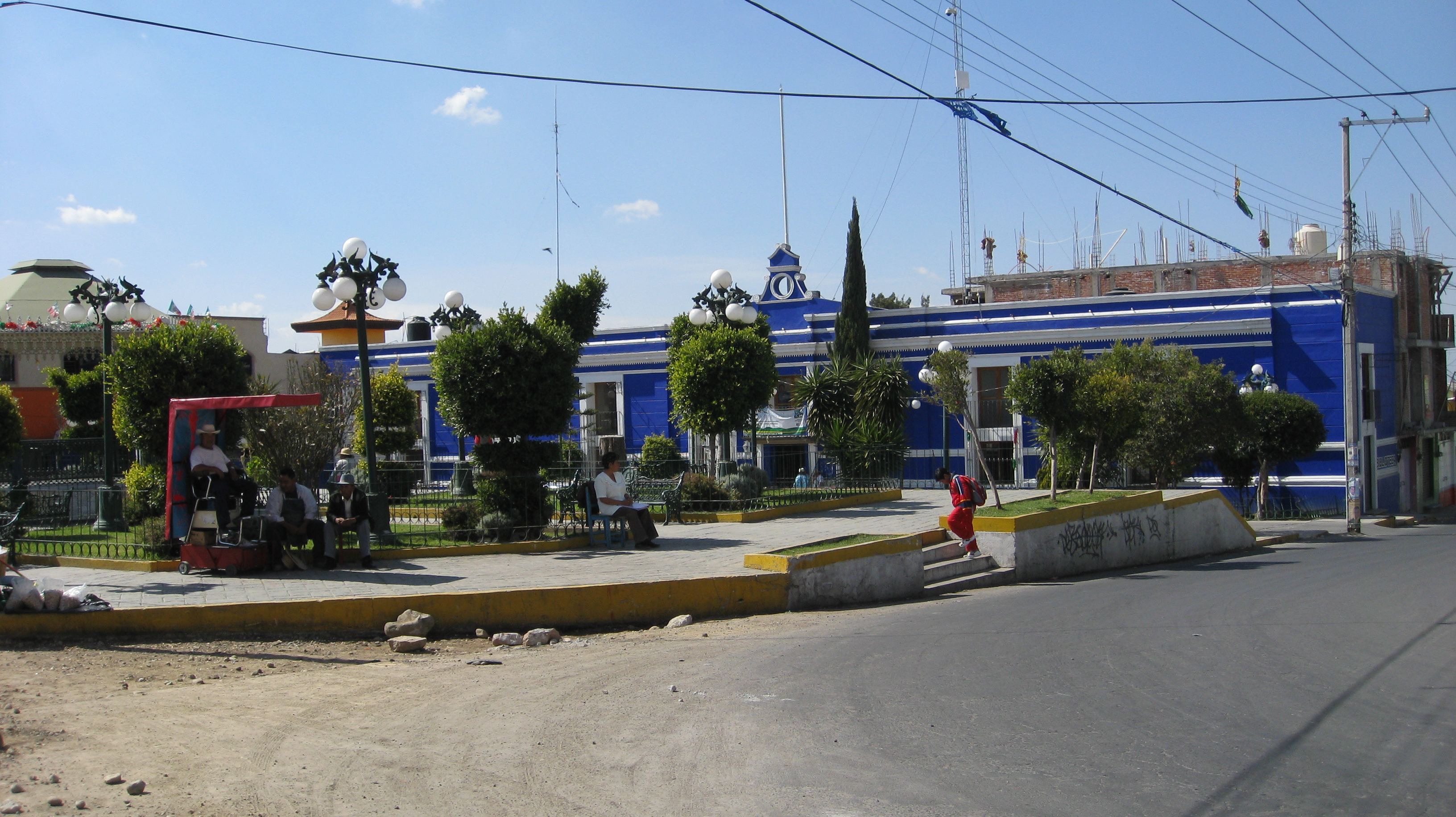 Tenancingo Tlaxcala Municipal Palace